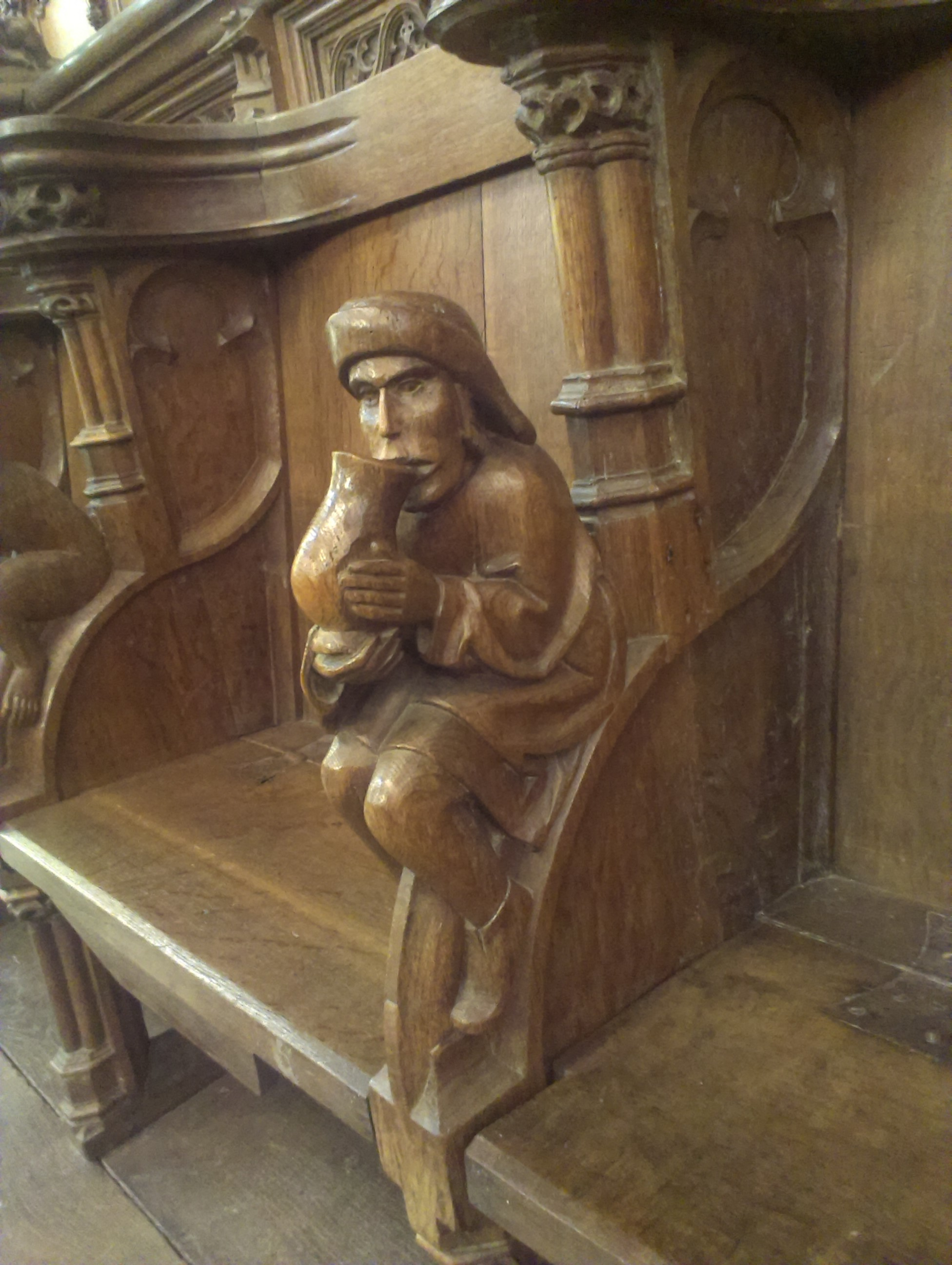 detail koorgestoelte Sint Catherinakerk in Hoogstraten